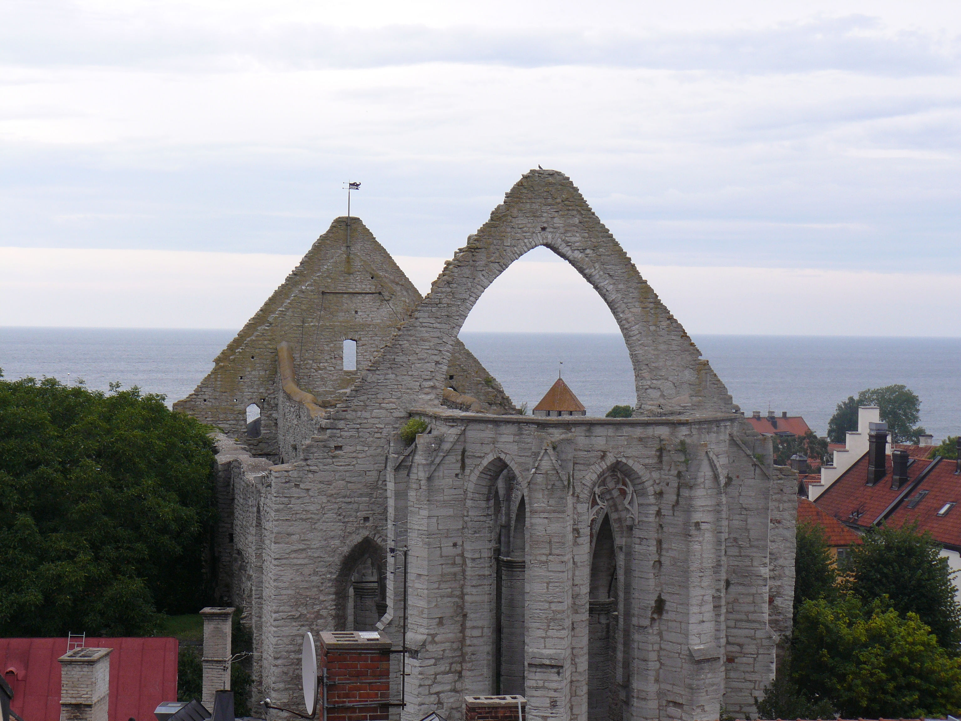 Zdjęcie zrobione w Visby w sierpniu 2007 roku.